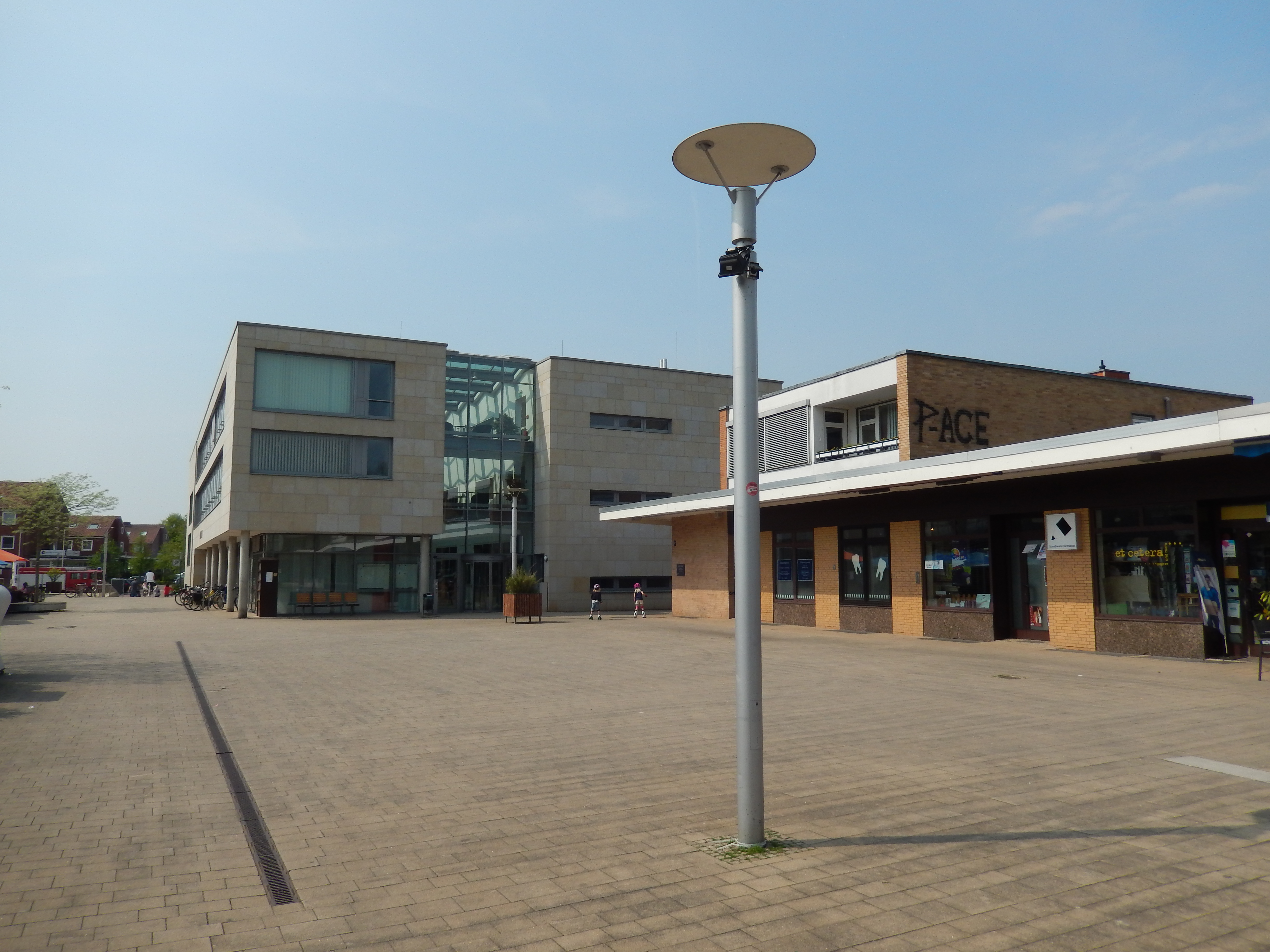 Marktplatz Hemmingen